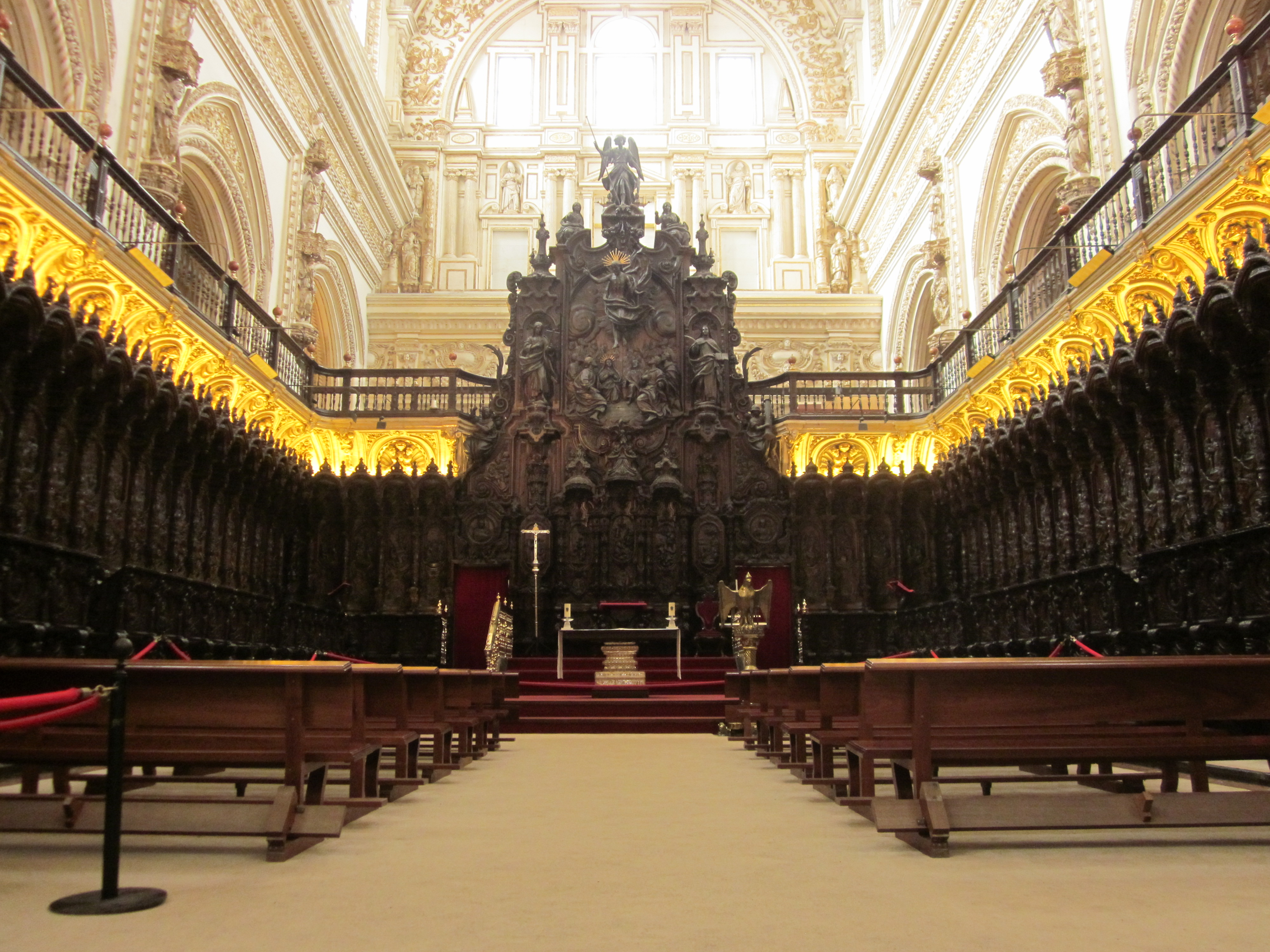 Coro de la Mezquita de Córdoba (España).